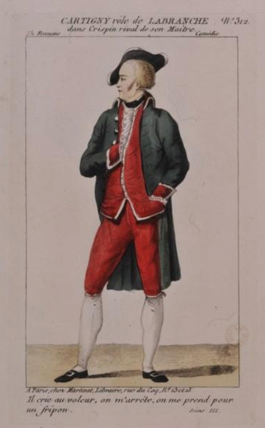 Crispin rival de son maître, de Alain-René Lesage : costume de Cartigny (la Branche)